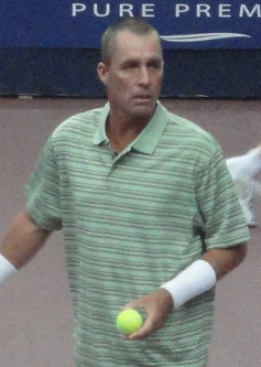 Ivan Lendl lors du Trophée Lagardère 2010 au Stade Pierre de Courbertin